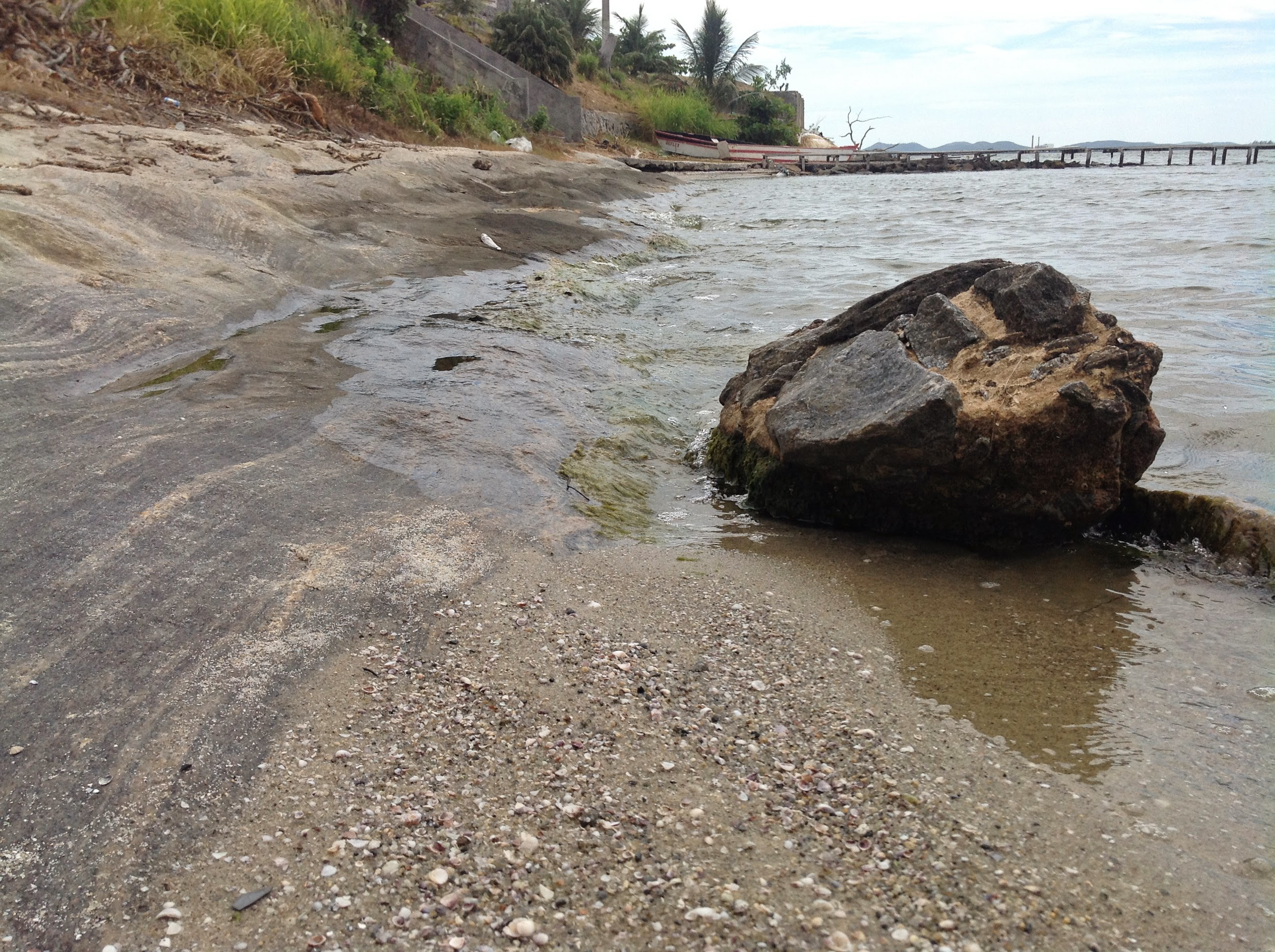 Baleia, São Pedro da Aldeia - RJ, Brazil